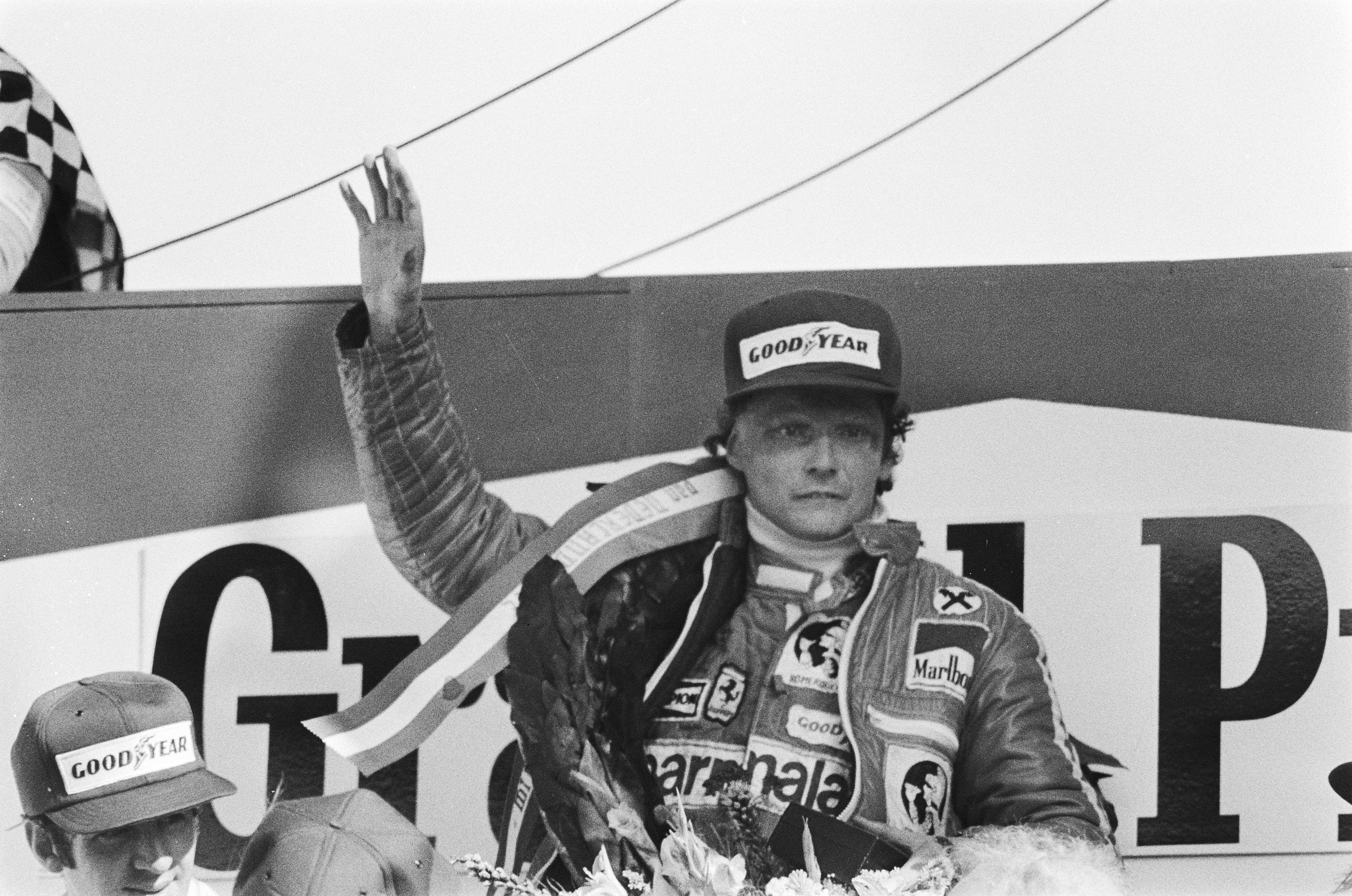 Grand Prix Zandvoort; Niki Lauda tijdens huldiging.